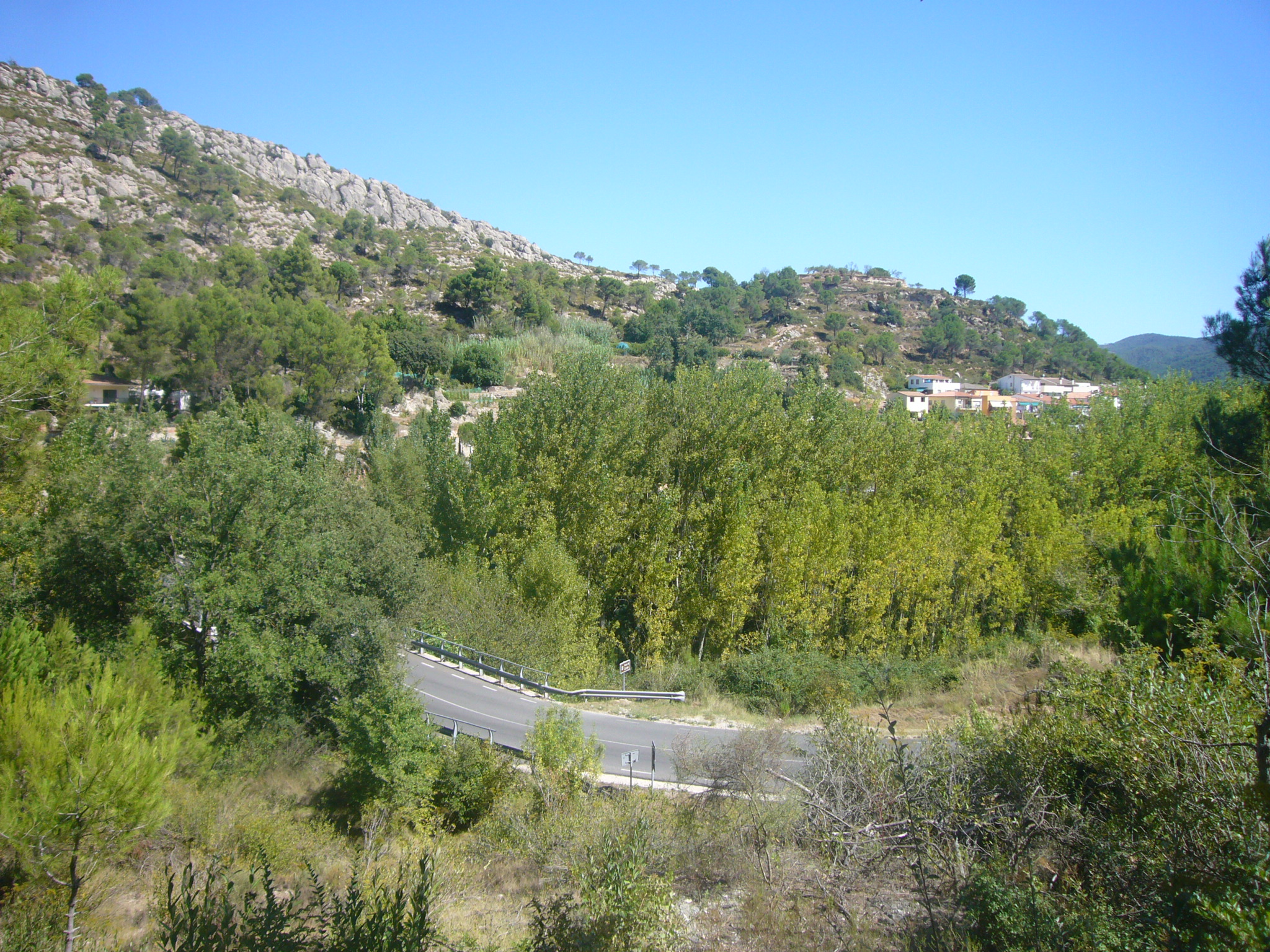 En primer terme, "pont de Carme", de la carretera C-244, sobre la riera de Carme. A l'esquerra, Serra de la Ninota. A la dreta, cases del barri de Sant Andreu (la Pobla de Claramunt), als peus de la muntanya de l'ermita de Sant Andreu. Vist des del camí a la font de Vinçó.